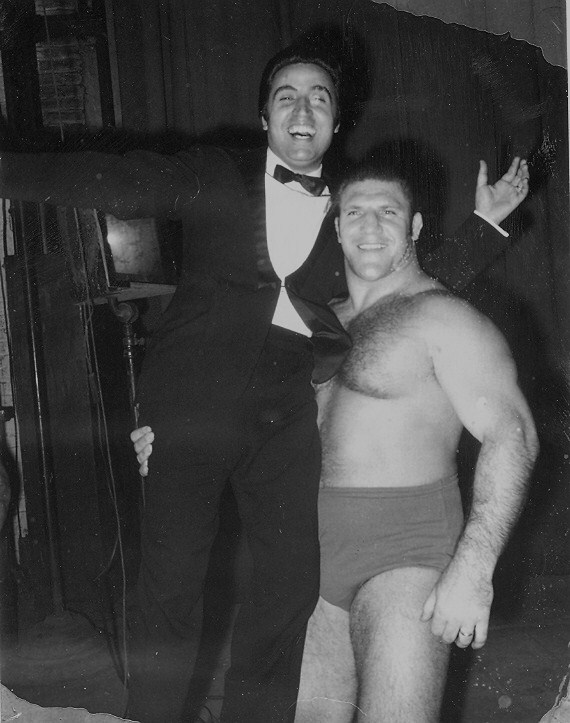 Mario Trevi e Bruno Sammartino a New York, negli anni sessanta. La fonte è lo stesso signor Trevi, che me l'ha fornita